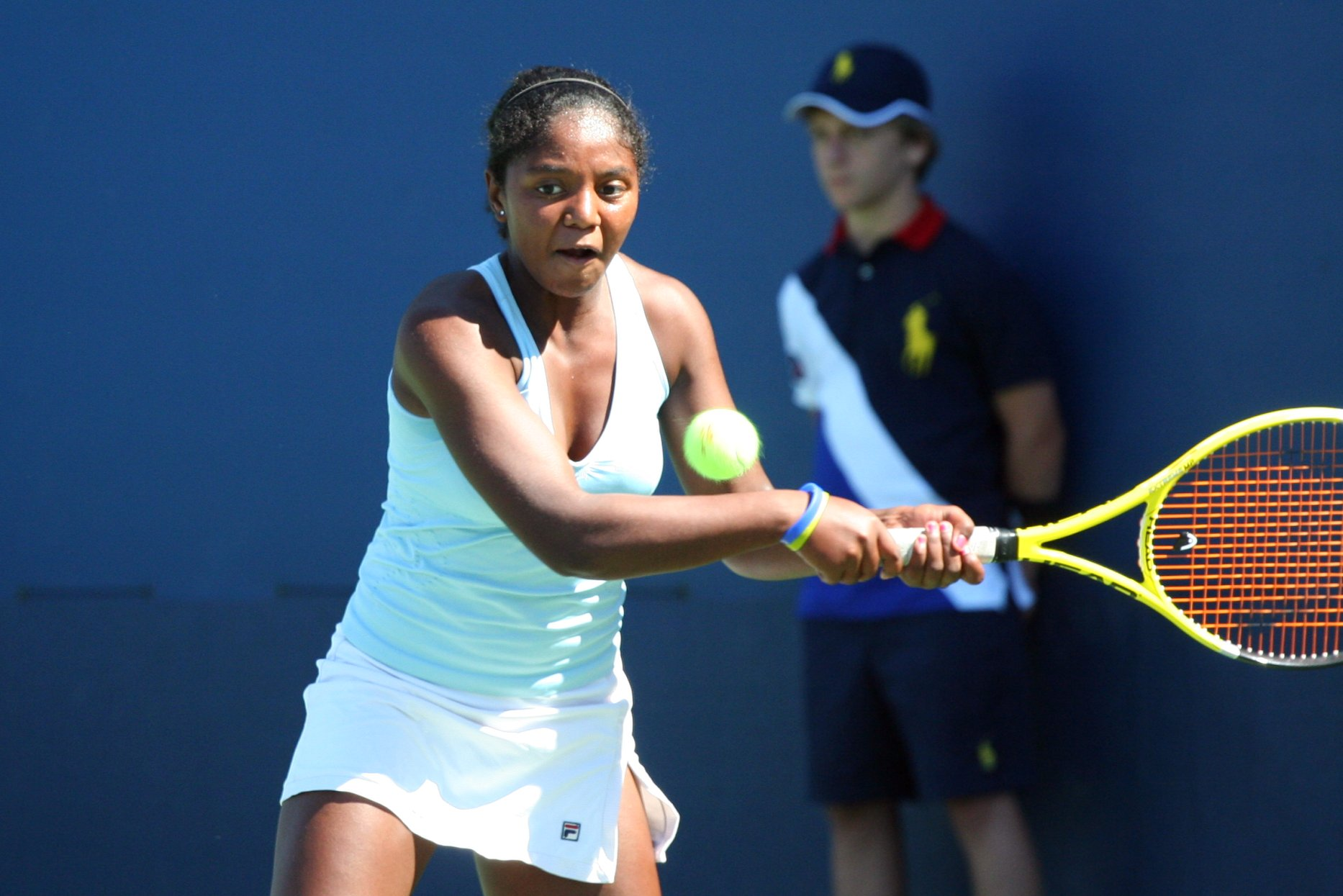 Zarah Razafimahatratra at U.S. Open Juniors September 5, 2010